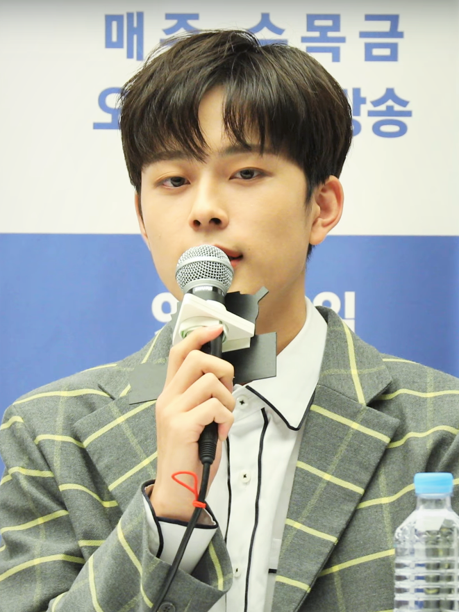 9월 17일 오후 1시 서울 상암동 스탠포드호텔에서 ‘악동탐정스 시즌2′ 제작발표회가 열렸다.